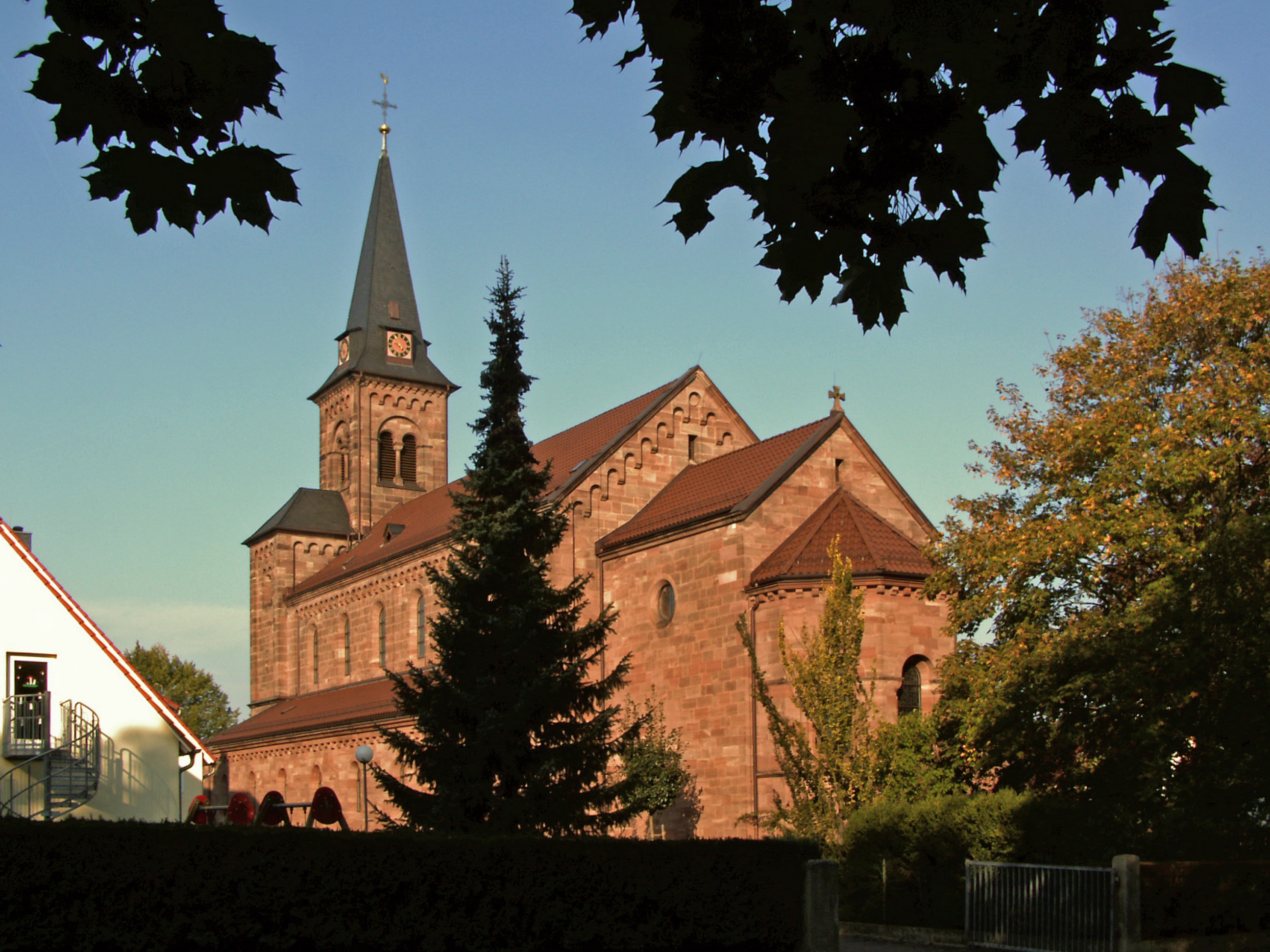 Katholische Kirche Maria Heimsuchung in Northeim